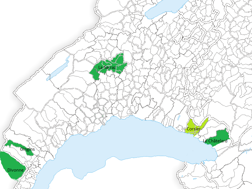 Carte des possessions de la famille de Gingins. Les lieux en vert clair sont les lieux où la famille ne possède qu'une partie des droits.